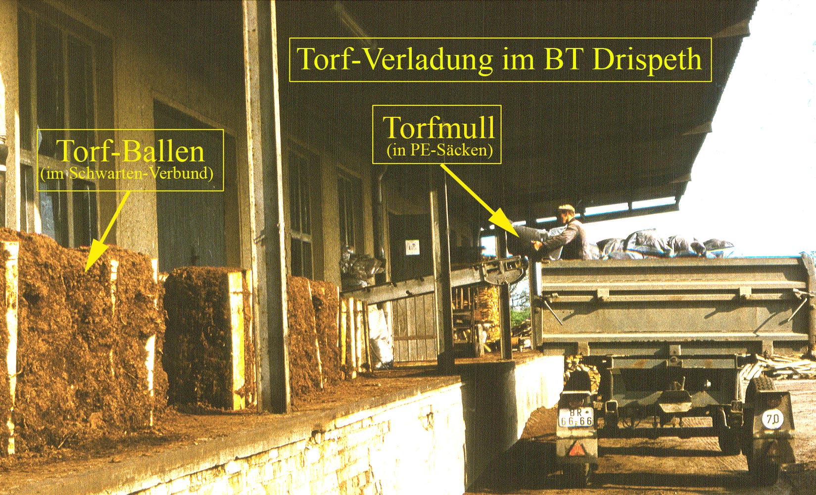 Torfgewinnung in West-Mecklenburg, Verladearbeiten im BT Drispeth